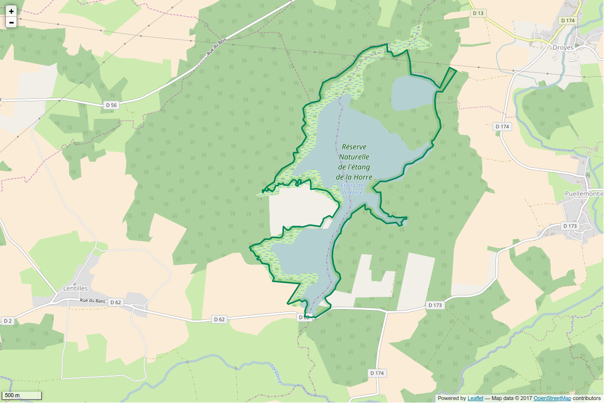 Périmètre de la RNN de l'Etang de la Horre.